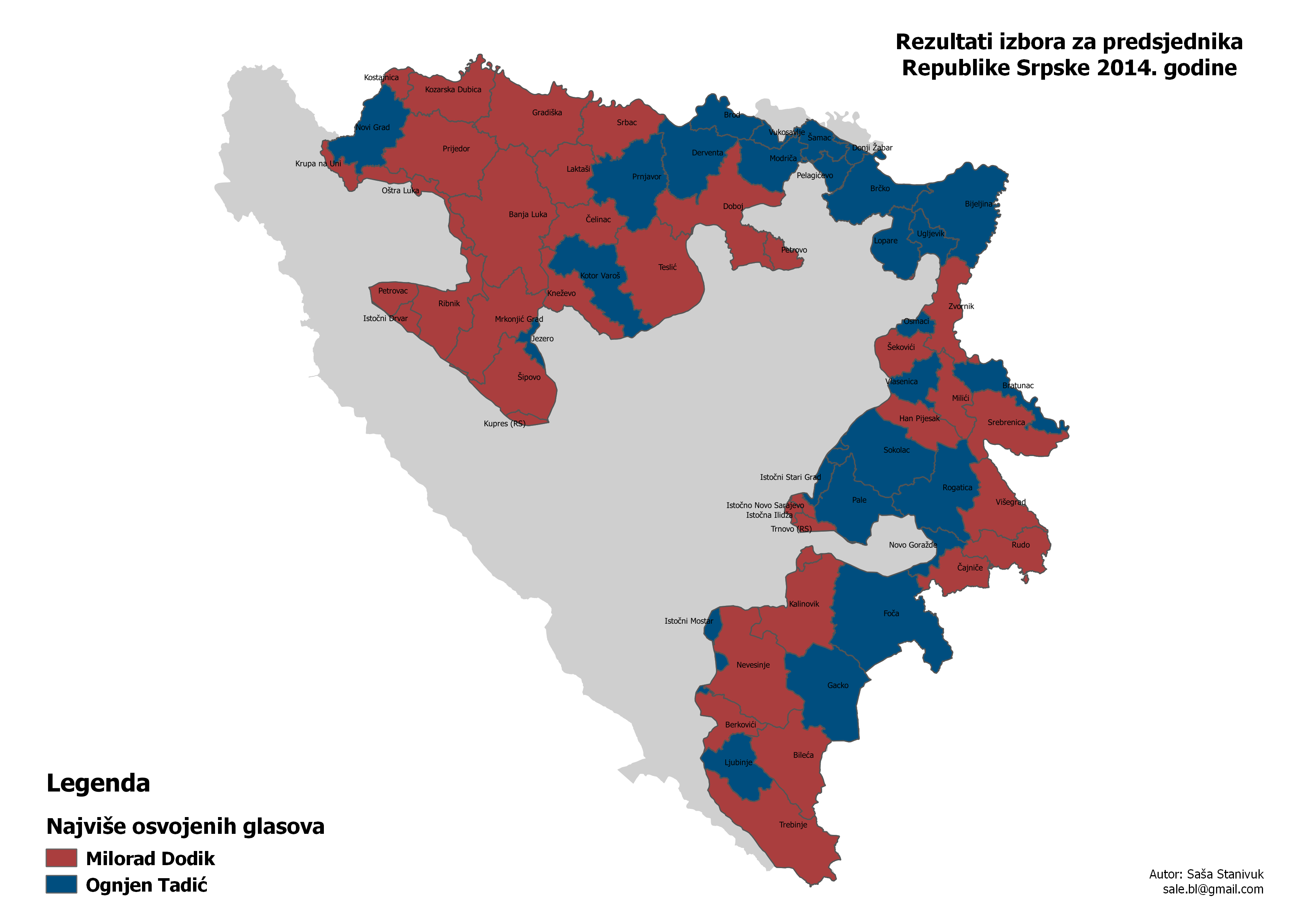 Srpskohrvatski / српскохрватски: Rezultati izbora za predsjednika Republike Srpske 2014. godine